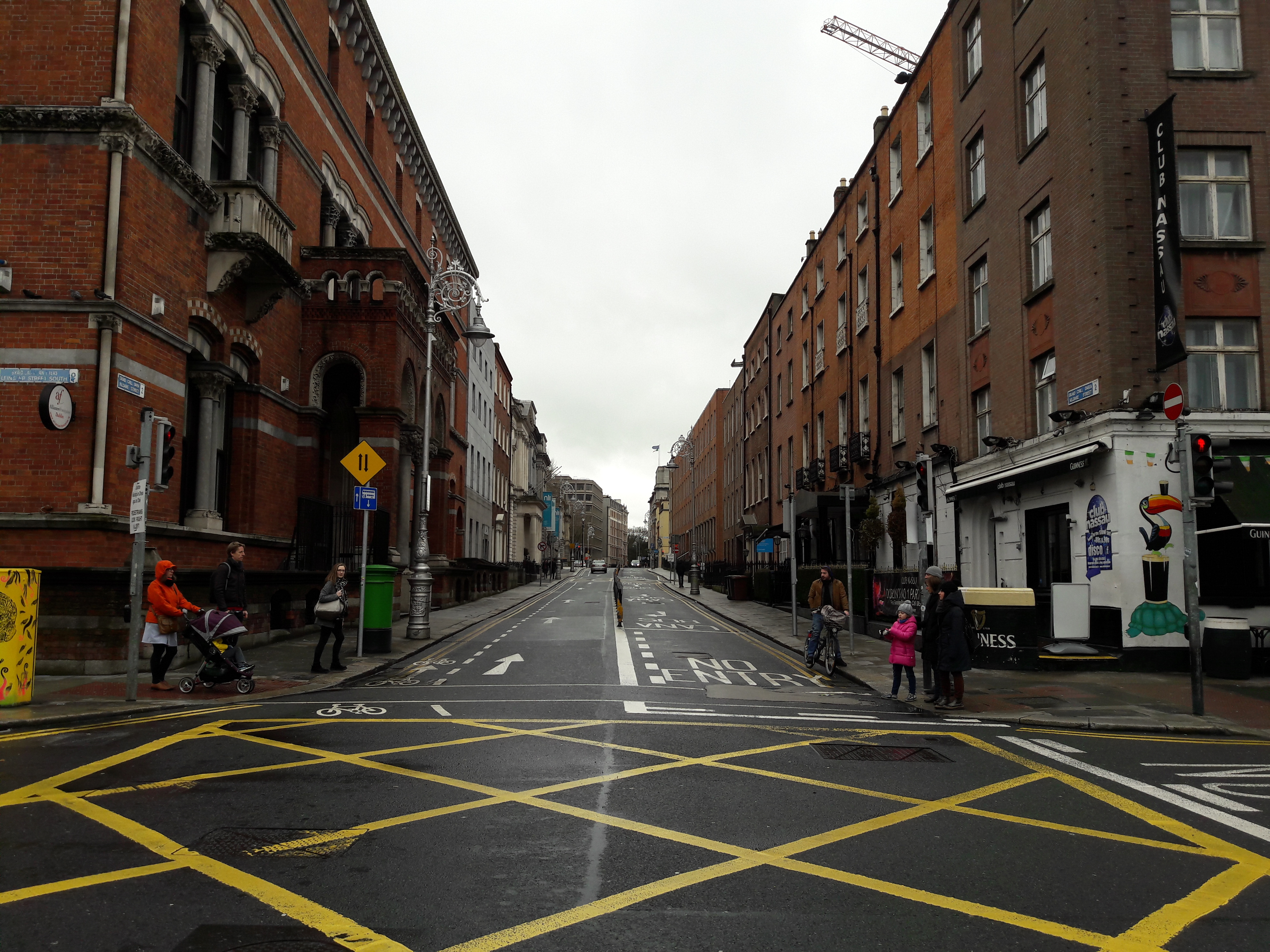 Kildare Street